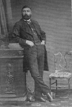 Imagen de Ramon Santamarina recortada